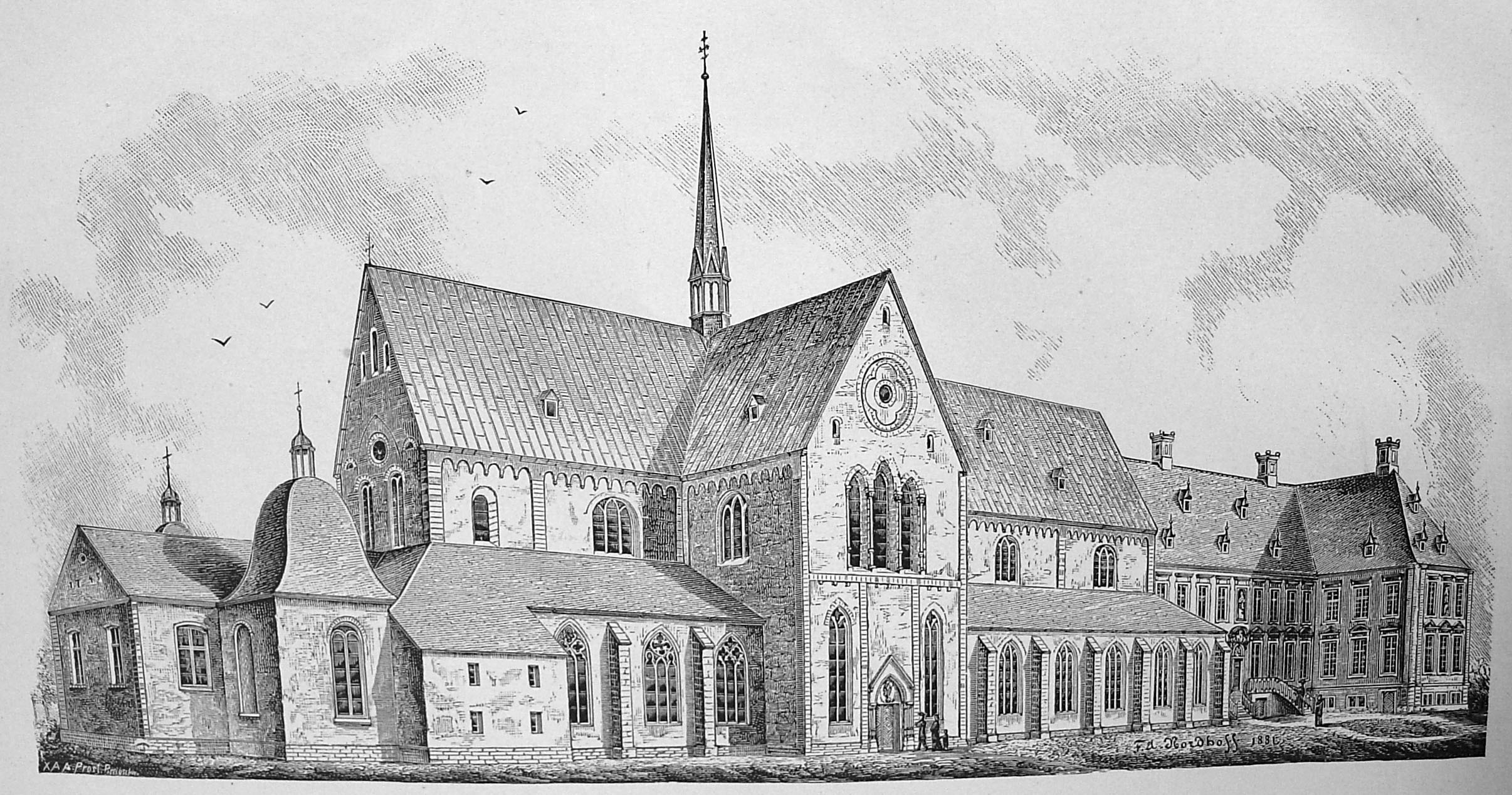 Ehemalige Klosterkirche Marienfeld